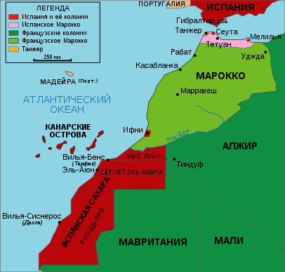 Карта французского и испанского протекторатов в Марокко в 1912.